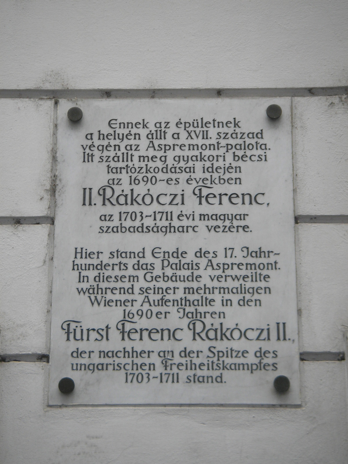 The Palais Erdödy-Fürstenberg at the Himmelpfortgasse in Vienna's first district Innere Stadt.